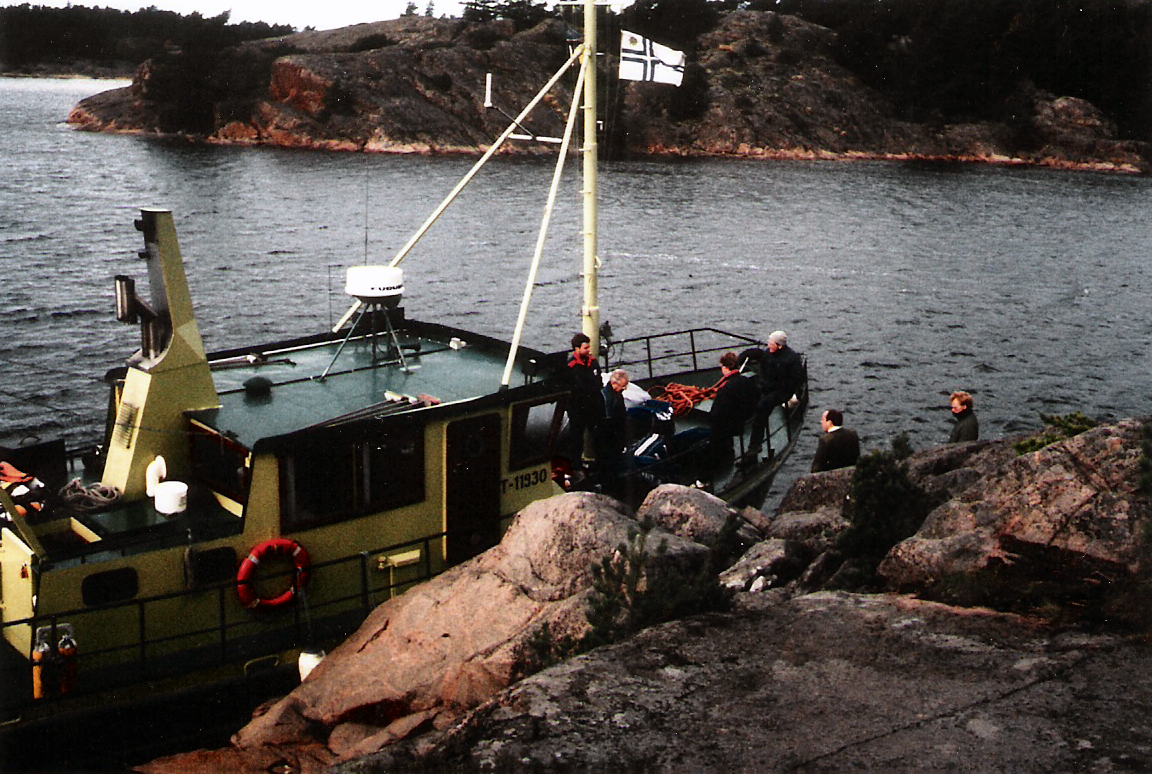 sukellustukialus satamassa